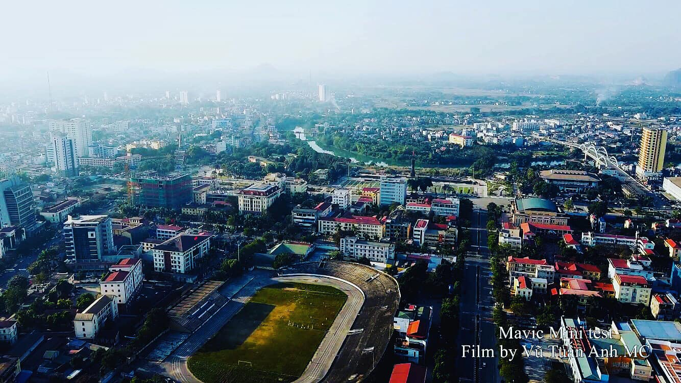 Một góc trung tâm thành phố Thái Nguyên